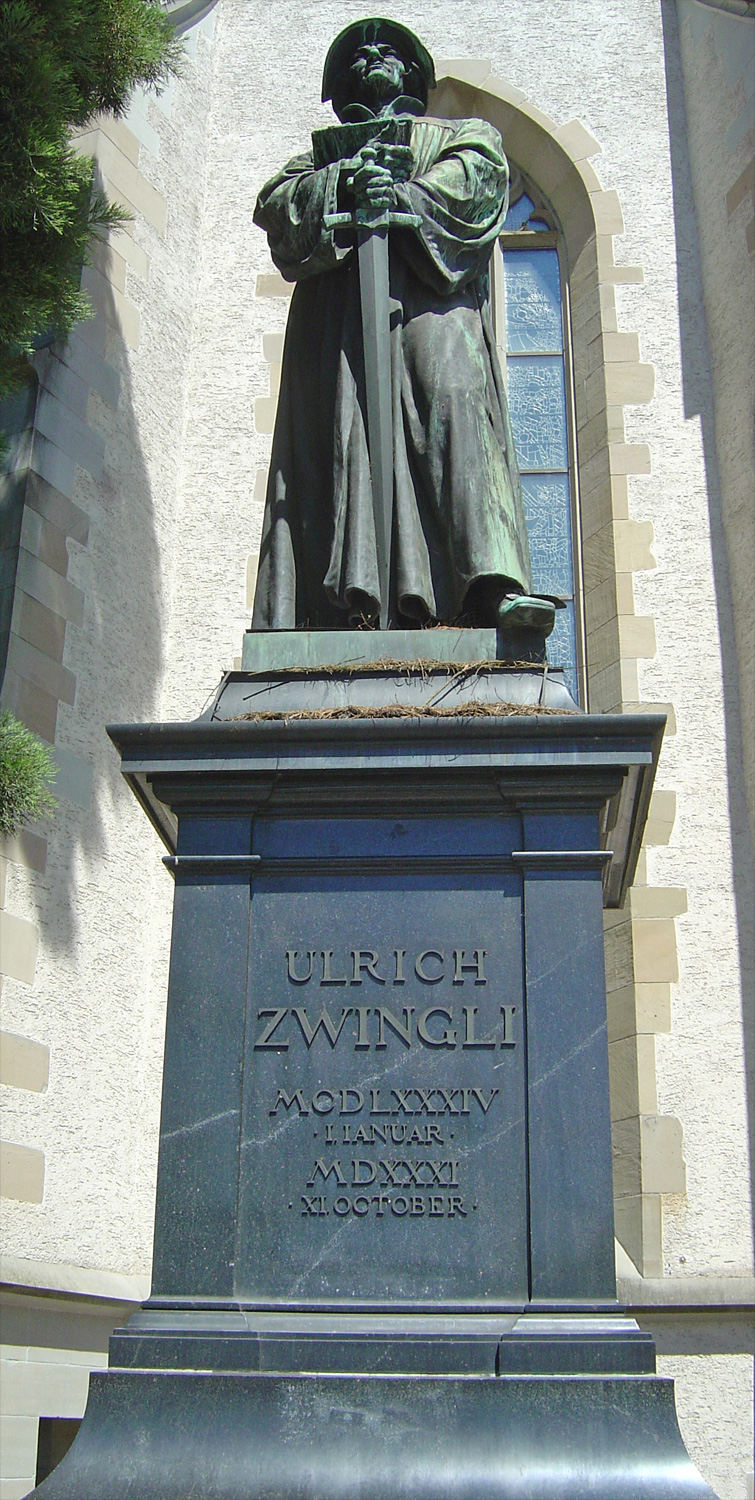 Das Denkmal des Reformators Ulrich Zwingli vor der Wasserkirche in Zürich. Bildhauer: Heinrich Natter